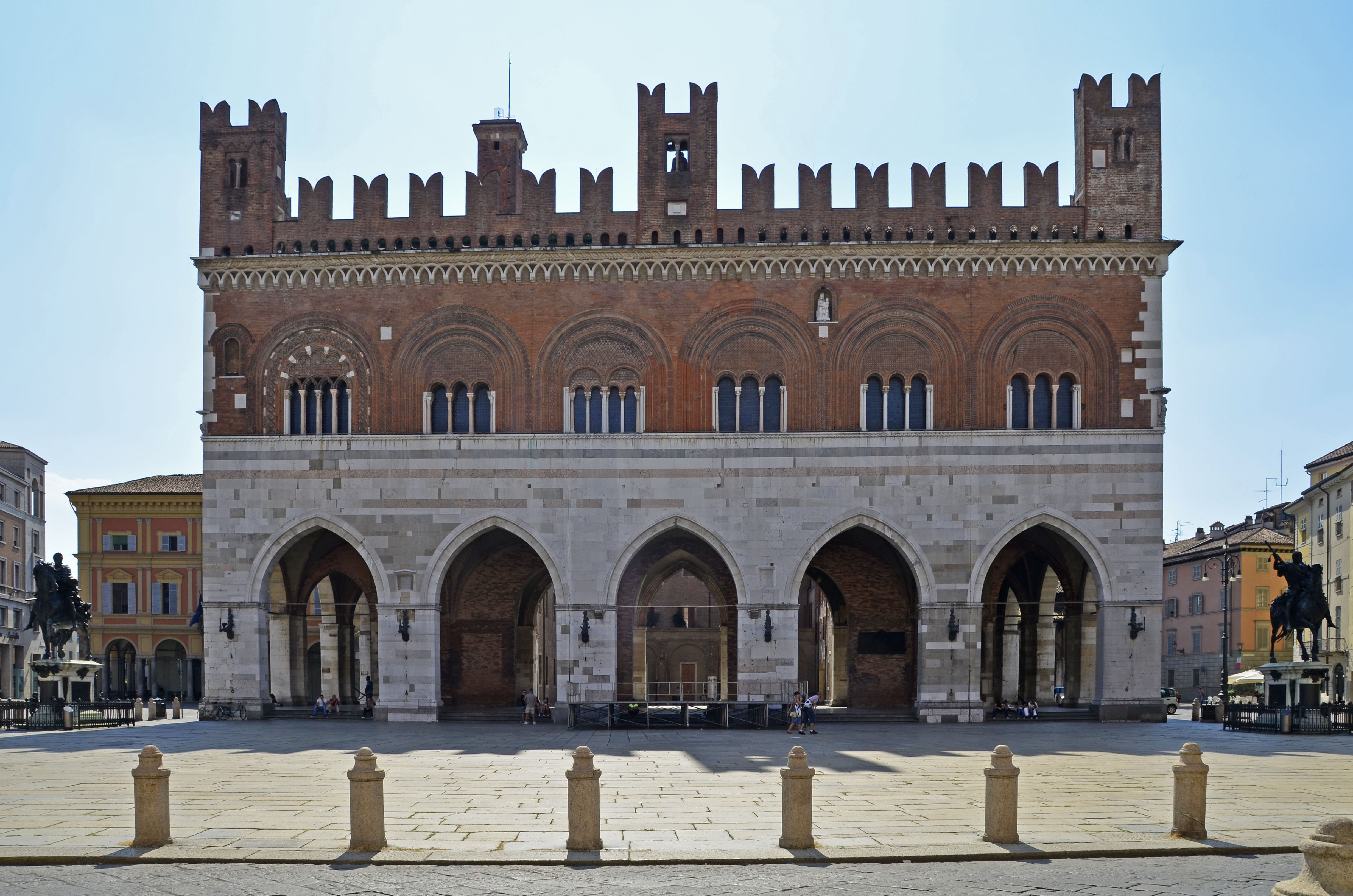 Palazzo Gotico This is a photo of a monument which is part of cultural heritage of Italy.